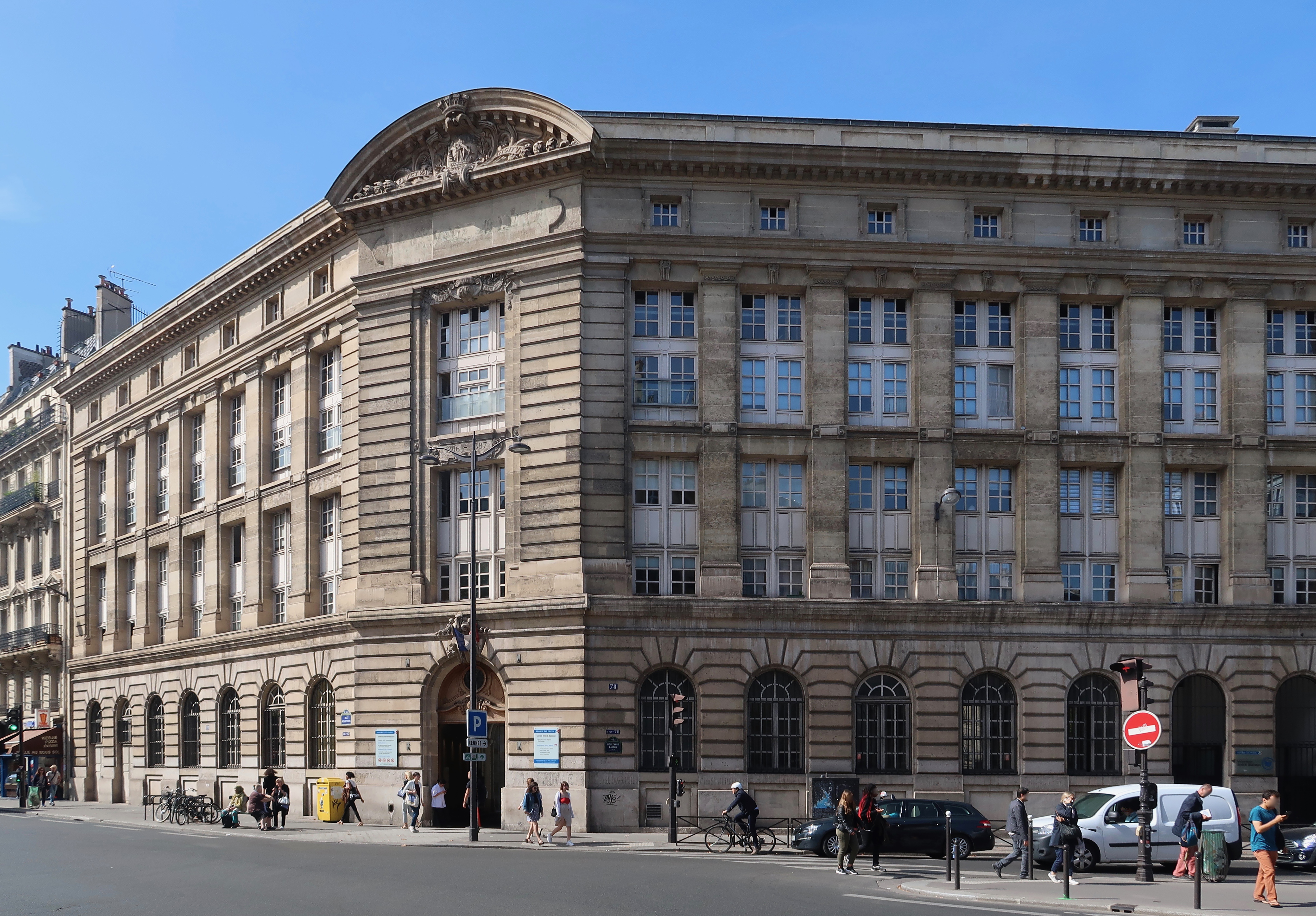 Bibliothèque André-Malraux, 112 rue de Rennes (Paris 6e).